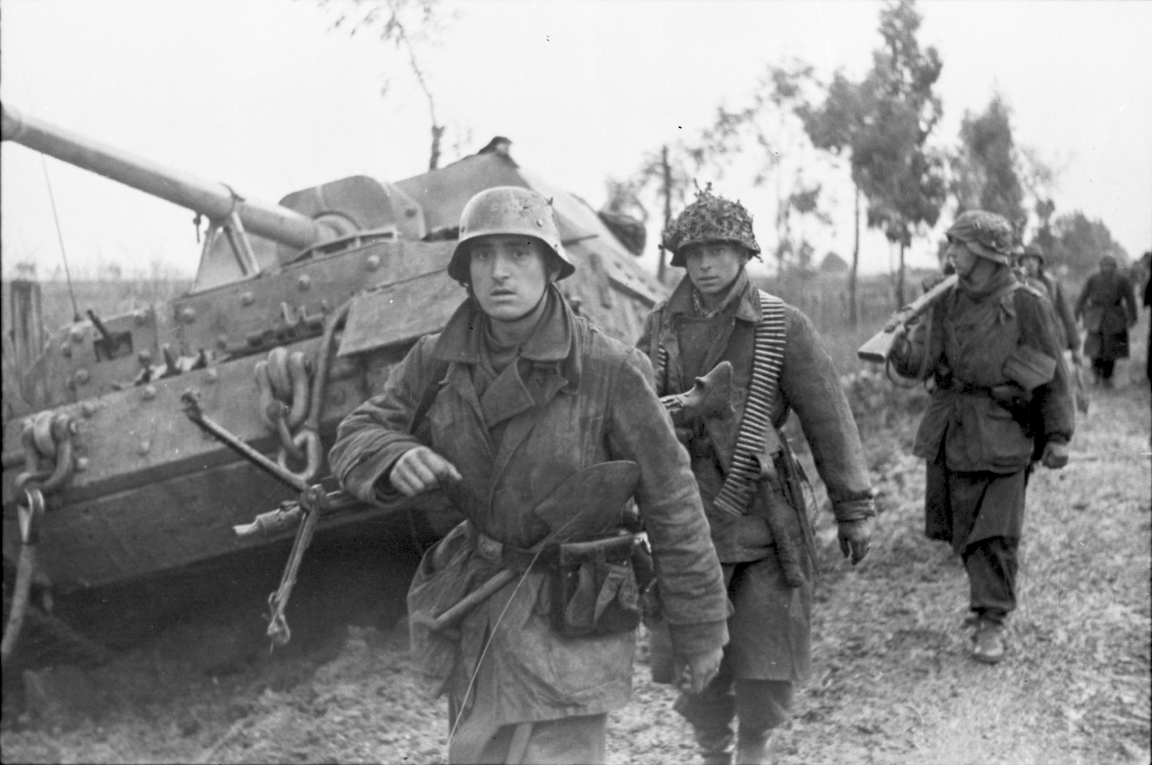 Kampfraum Nettuno Unbeirrt durch anglo-amerikanische Artillerie und Tiefflieger geht der Vormarsch der deutschen Grenadiere im Landekopf von Nettuno weiter. 20.3.44 [Herausgabedatum] Foto: PK-Koch/Transocean-Europapress/PK